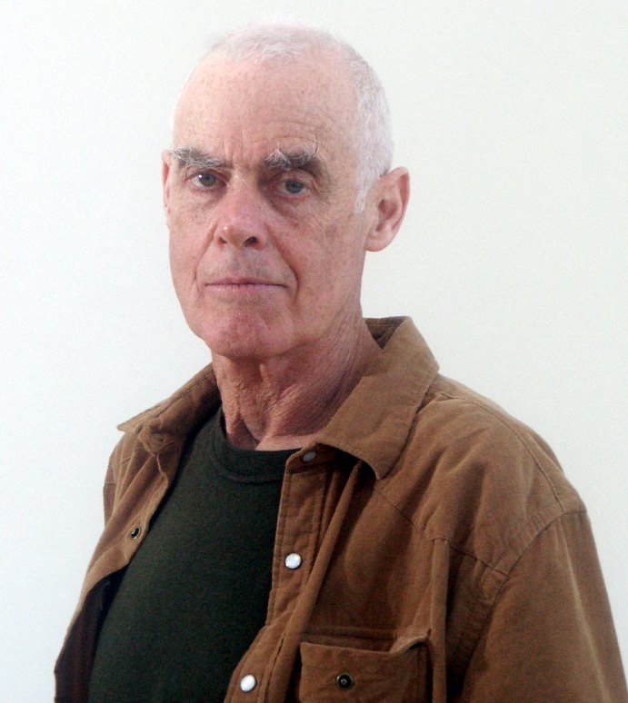 British artist Richard Long